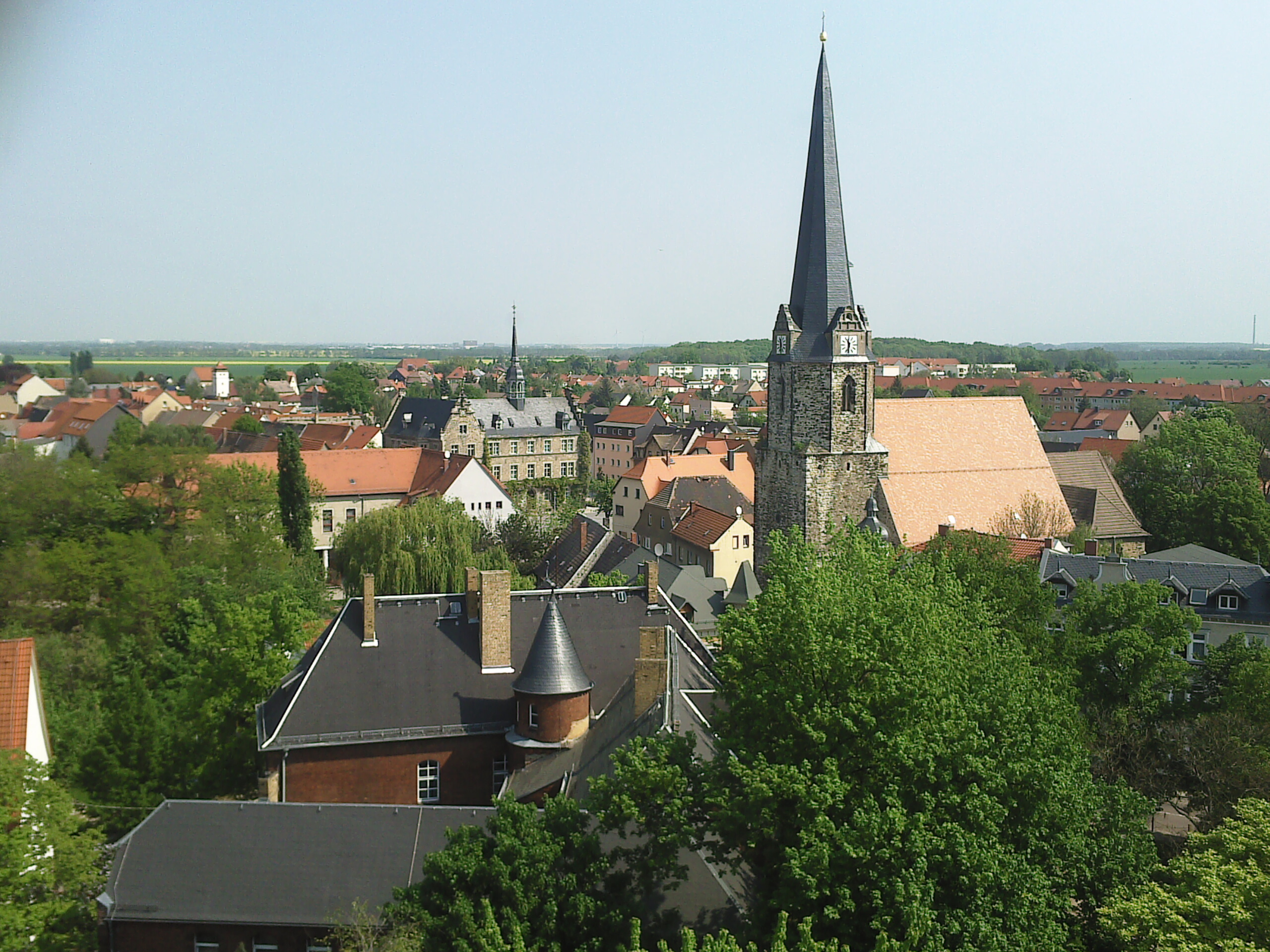 Aussicht vom Schlossturm